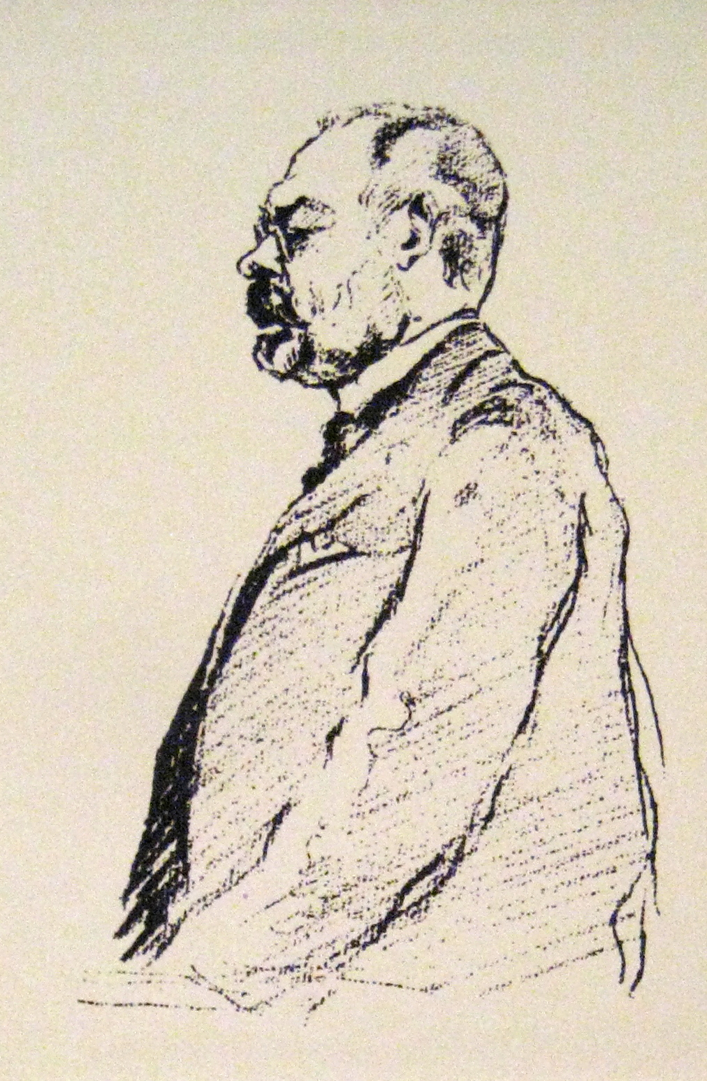 Ю.К. Арцыбушев. Портреты политических деятелей. Москва, 14 августа 1917. ГИМ. Зарисовки с натуры, выполненные во время Государственного совещания в Москве, были опубликованы в издательстве Д.Я. Маковского